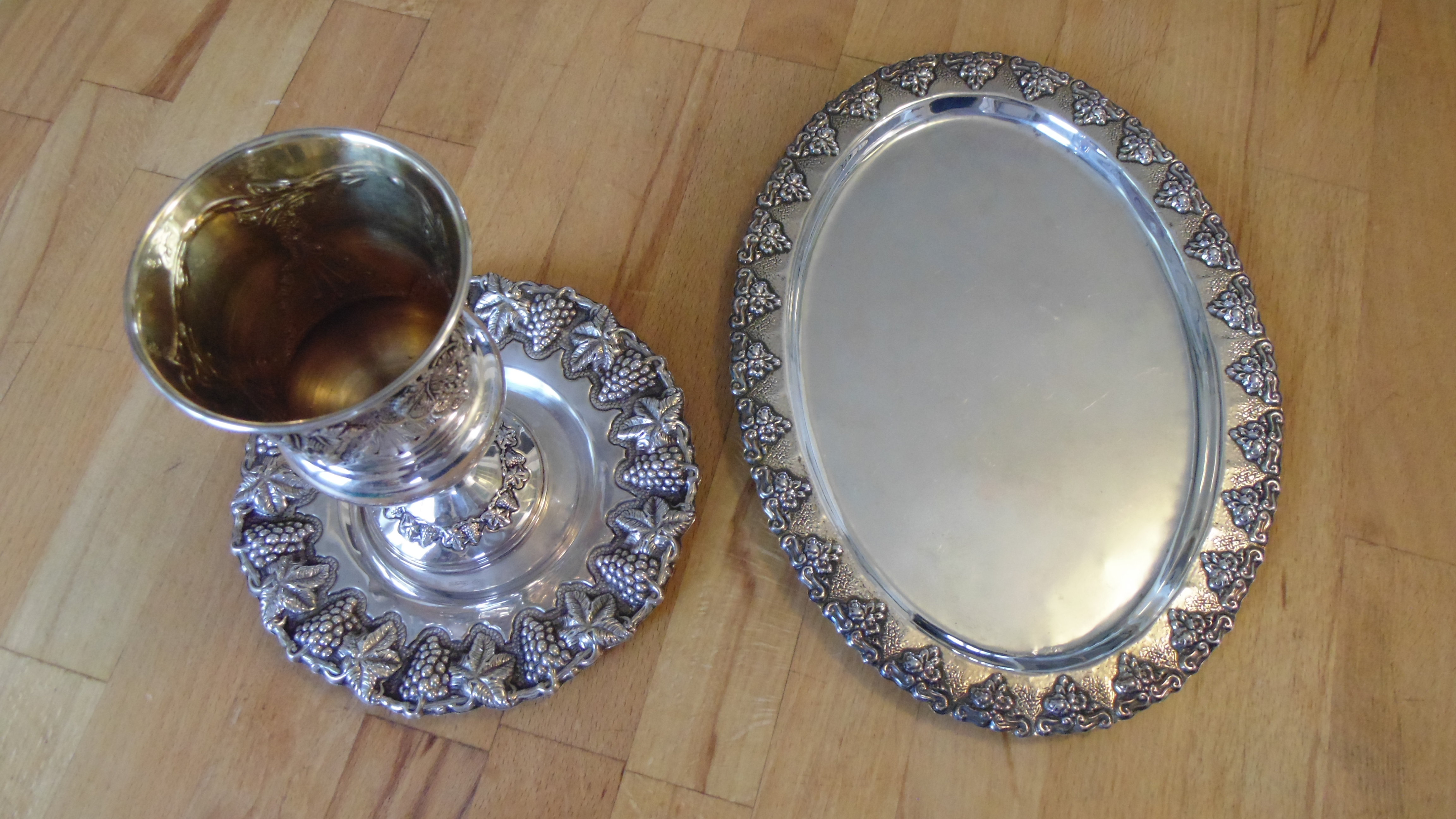 Kiddouch en argent massif et vermeil avec son plat pour Chabbat